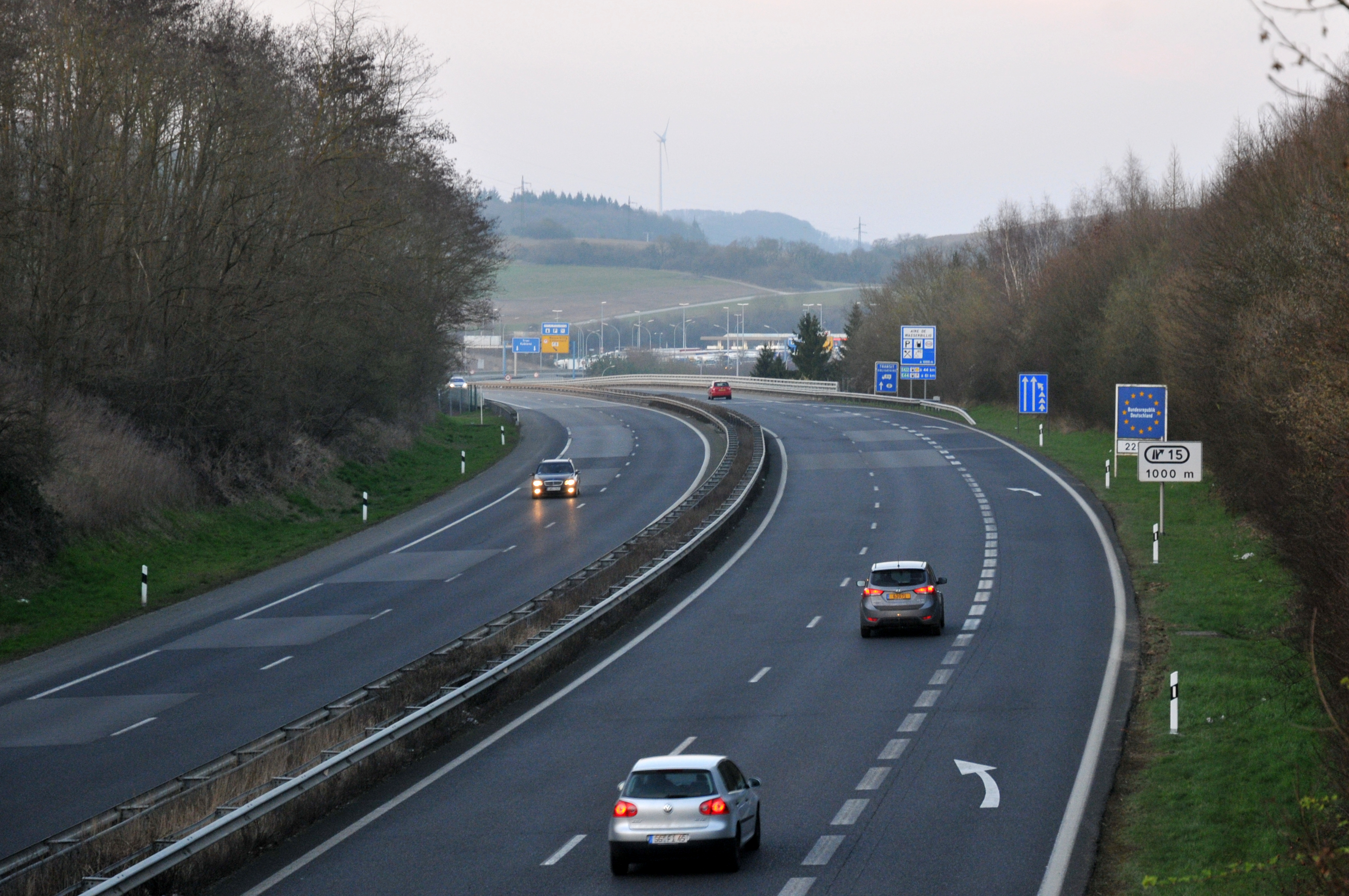 D'Tréierer Autobunn a Richtung Däitschland, kuerz vrun der "Aire de Wasserbillig".